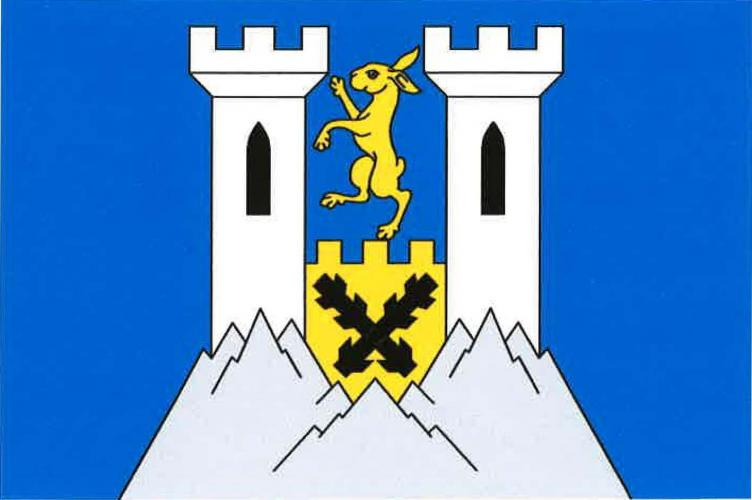 vlajka, Klapý, okres Litoměřice